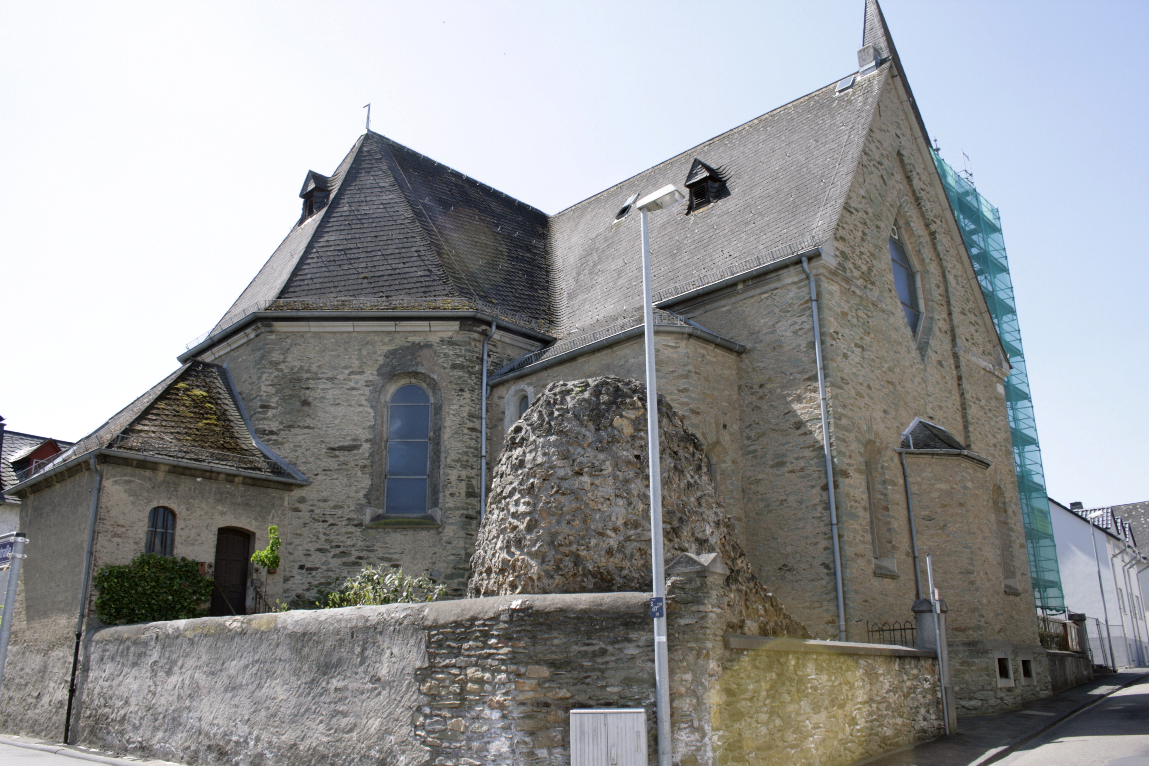 Alte Kirche in Lindenholzhausen, Deutschland